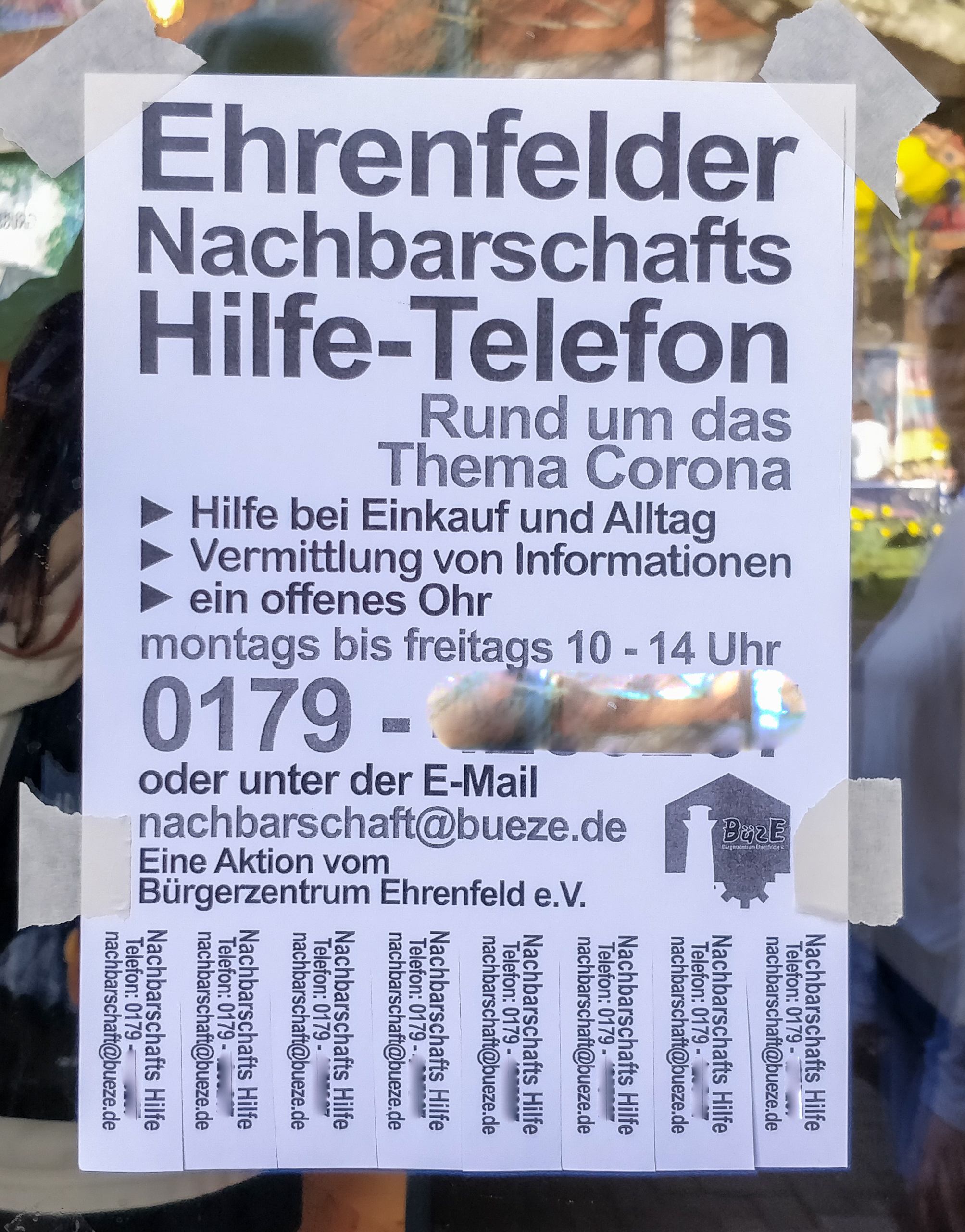 Ehrenfelder Nachbarschafts Hilfe-Telefon - COVID-19-Pandemie. Hilfe bei Einkauf und Alltag, Vermittlung von Informationen, ein offenes Ohr. Eine Aktion vom Bürgezentrum Ehrenfeld e.V.